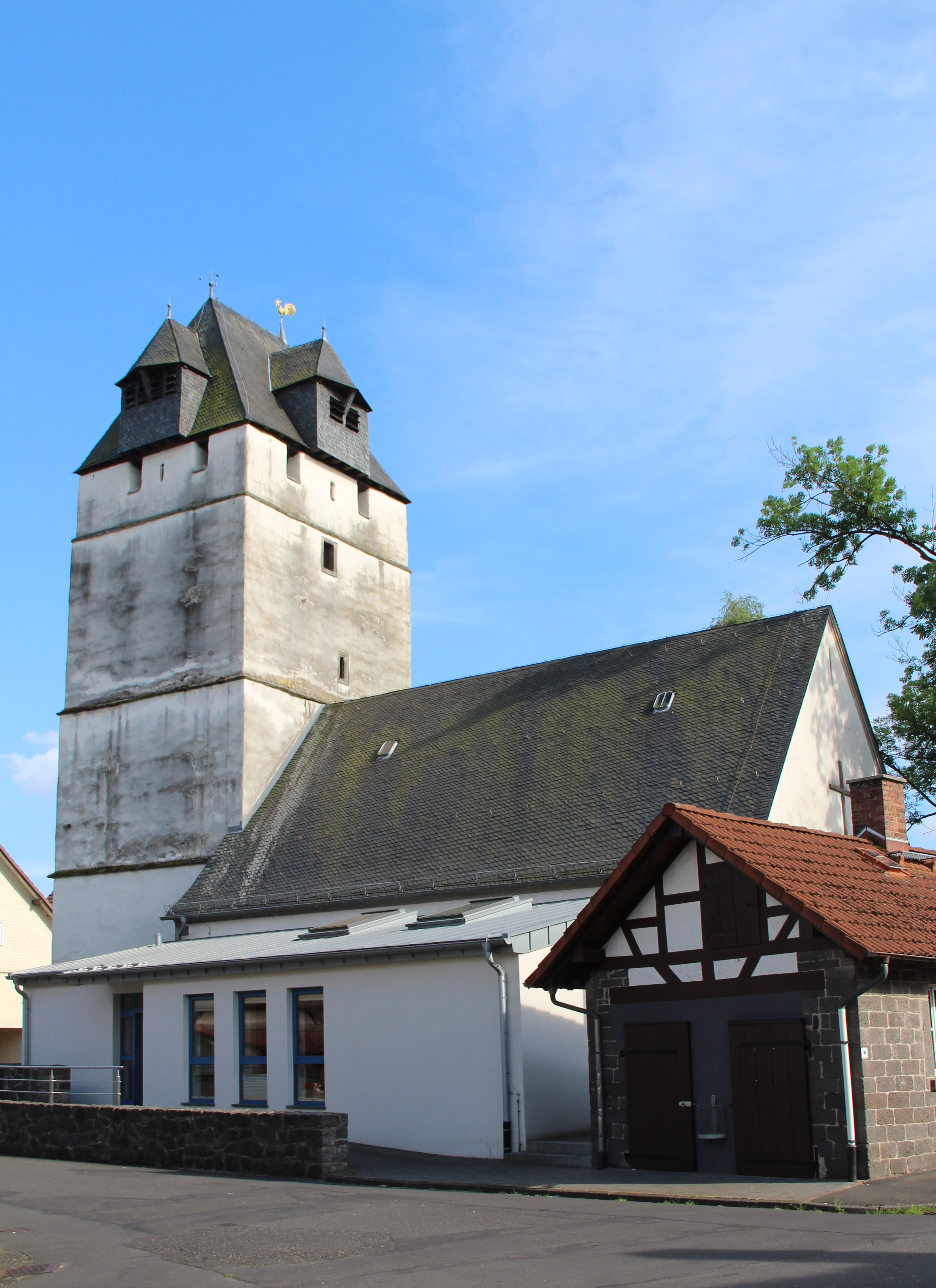 Evangelische Kirche von Nordwesten. Am rechten Bildrand das gelegentlich noch genutzte Backhaus.